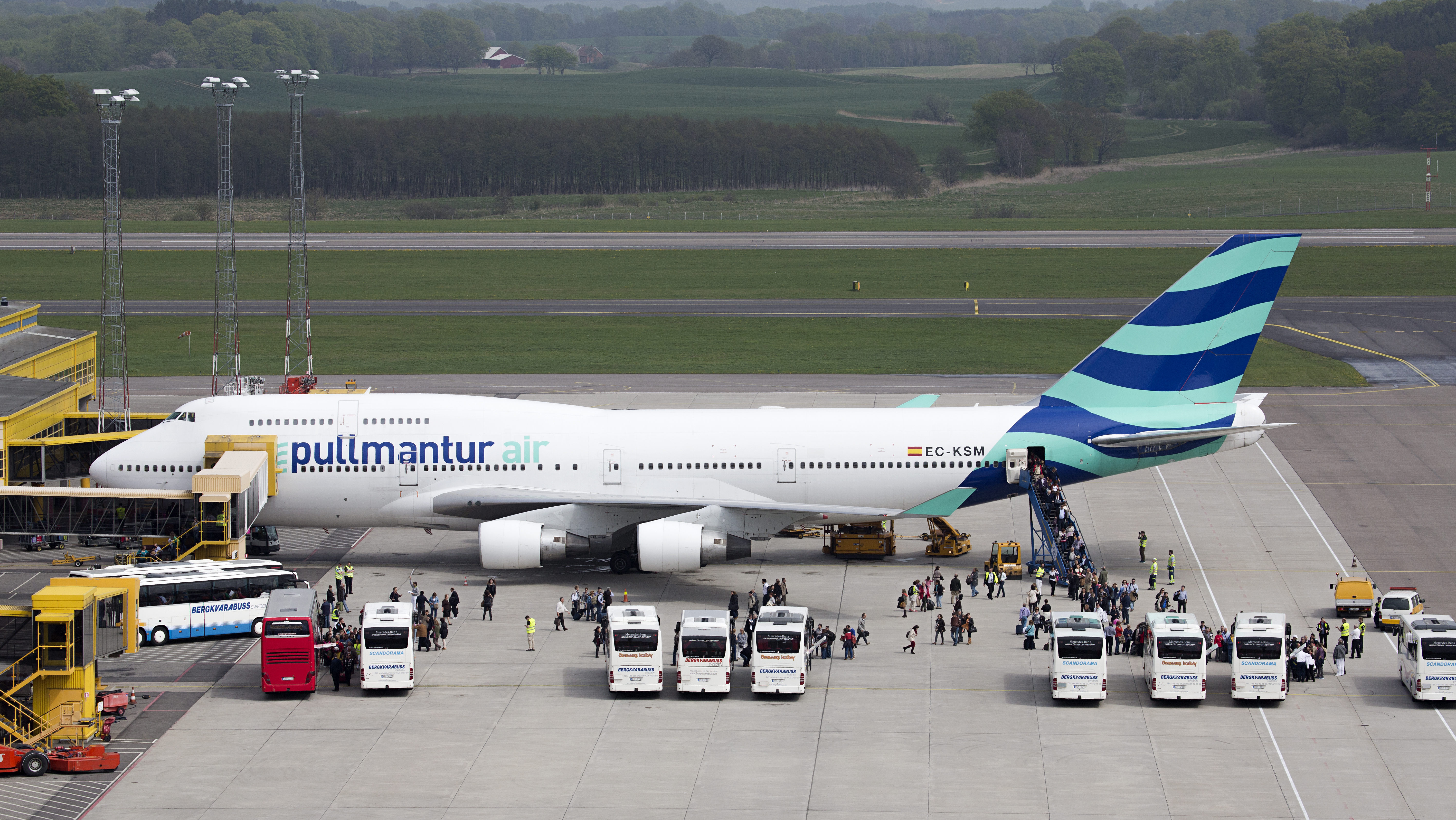 Premiären för kryssingsarrangören Pullmantur att angöra Malmös nya kryssningsterminal med kryssningsfartyget Empress den 11 maj 2013 innebär även högtryck för Malmö Airport vid Sturup. Vid tretiden på eftermiddagen den 11 maj slog Malmö Airport nytt rekord med 1.800 passagerare som passerade terminalbyggnaden under en timme. Varannan lördag mellan 11 maj och 14 september landar Pullmantur Airs två Boeing 747 jumbo jet samt fyra Airbus från flygbolagen Vueling och Iberia för att lämna och hämta passagerare som bussas direkt till/från kryssningsterminalen som drivs av Malmö och Københavns gemensamma hamnbolag Copenhagen Malmö Port, CMP. Enligt CMP krävs det 70 bussar samt 25 spansktalande guider för att köra passagerna till fartyget samt guida dem i Skåne och på Sjælland. För Malmö Airport innebär kryssningsflyget cirka 35.000 kommande och avresande resenärer under 2013. Photo: News Øresund - Johan Wessman © News Øresund Bilden får fritt publiceras under förutsättning att källa anges (Foto: News Øresund - Johan Wessman). The picture can be used freely under the prerequisite that the source is given (Photo: News Øresund - Johan Wessman). News Øresund, Malmö, Sweden. News Øresund är en oberoende regional nyhetsbyrå som ingår i projektet Øresund Media Platform som drivs av Øresundsinstituttet i partnerskap med Lunds universitet och Roskilde Universitet och med delfinansiering från EU (Interreg IV A Öresund) och 14 regionala; icke kommersiella aktörer.